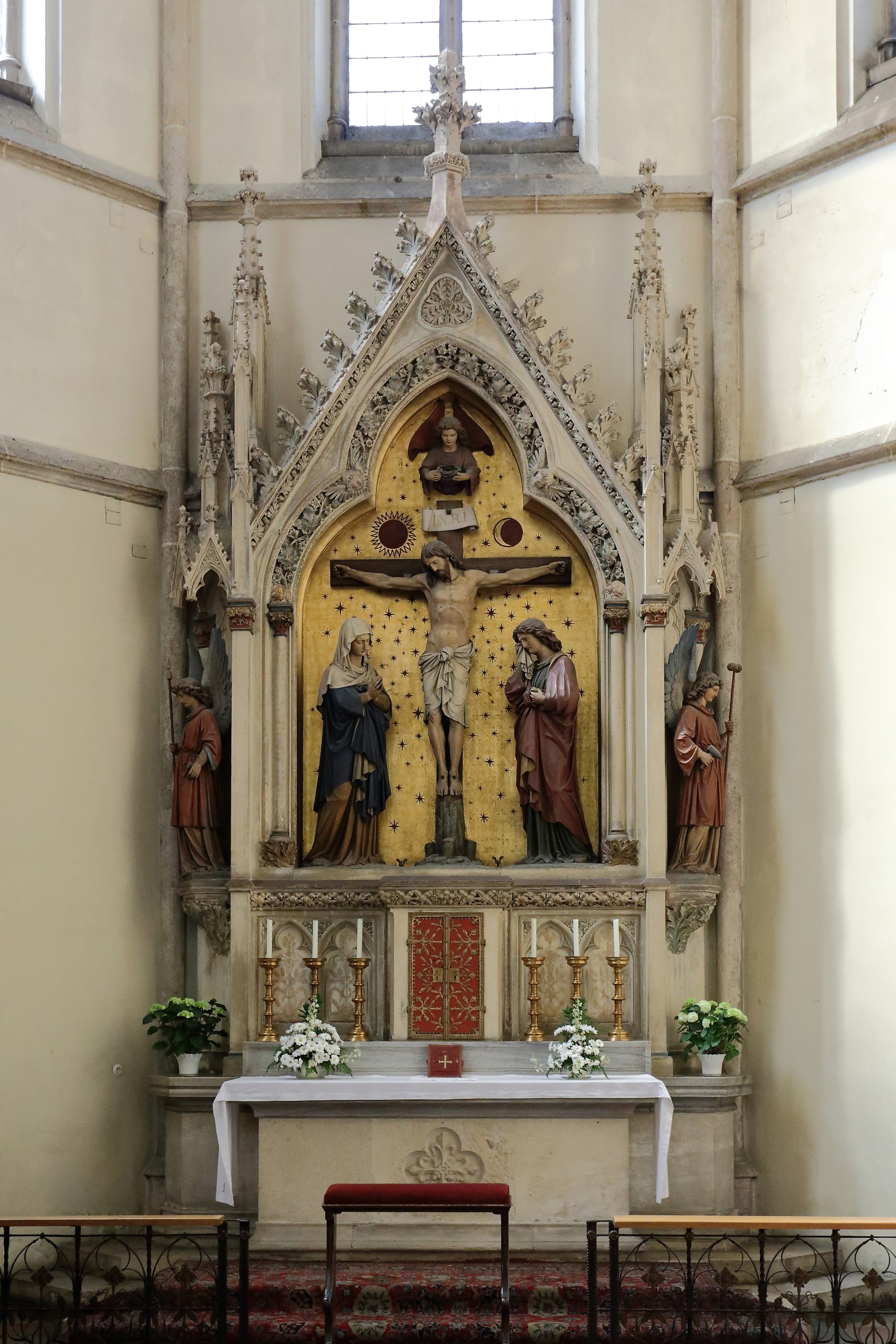 Kreuzaltar am linken Ende des Querschiffs in der Othmarkirche im 3. Wiener Gemeindebezirk.